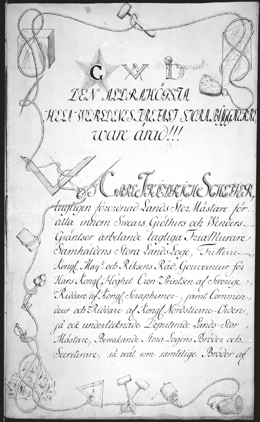 Warrant for the masonic lodge "Zur Eintracht" in Stralsund, 1762. Stiftungsurkund des Freimaurerloges "Zur Eintracht", Stralsund, 1762. Konstitutionspatent för frimurarlogen "Zur Eintracht", Stralsund, 1762.